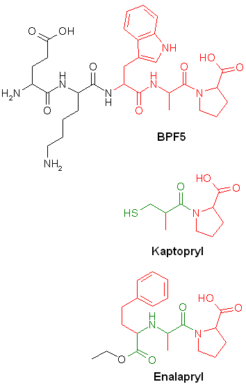 Strukturanalogie von ACE-Hemmern mit BPP5a. Erstellt von: Sven Jähnichen. Erstellt am: 31.10.2004. Lizenz: GNU-FDL. Polish version.